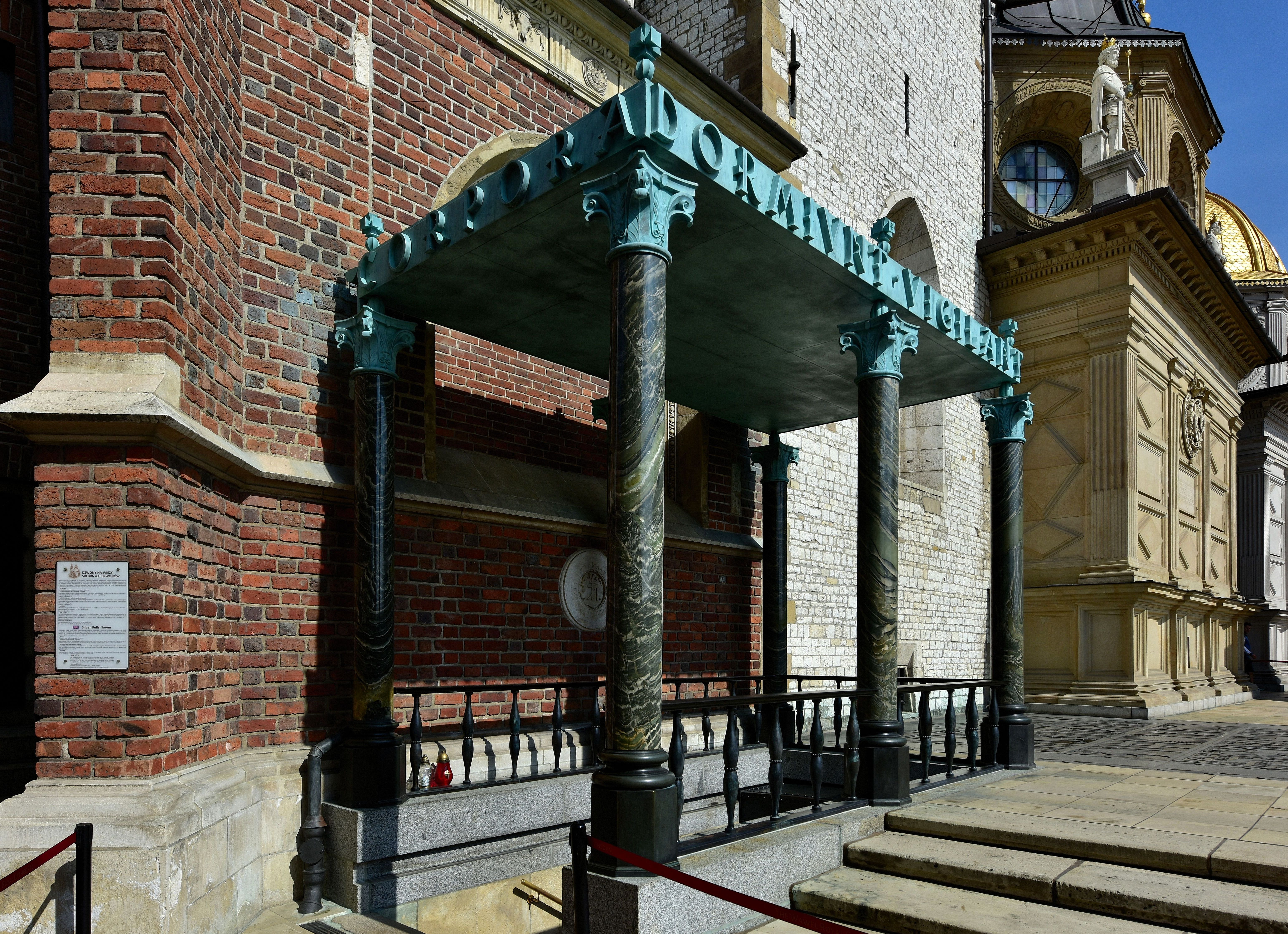 Baldachimu nad wejściem do grobów królewskich na Wawelu